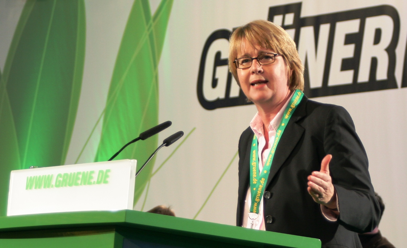 Krista Sager Anfang Dezember 2006 auf dem Bundesparteitag der Grünen in Köln.